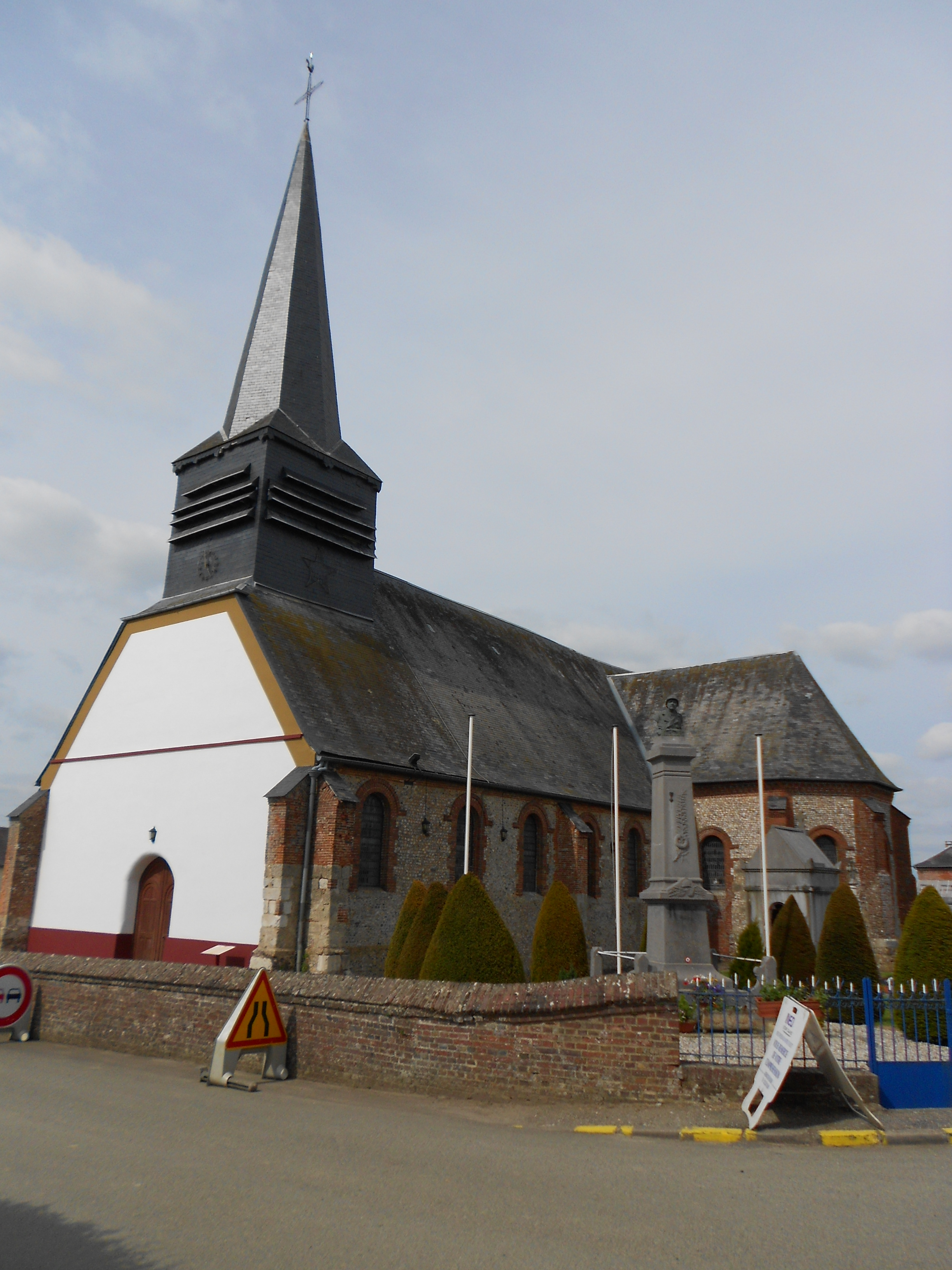 Eglise de Criquiers (Seine-Maritime, 76)